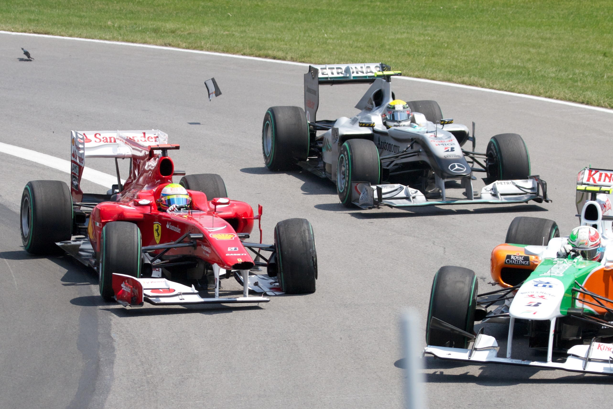 Lap 1, Turn 2, Massa hits Liuzzi